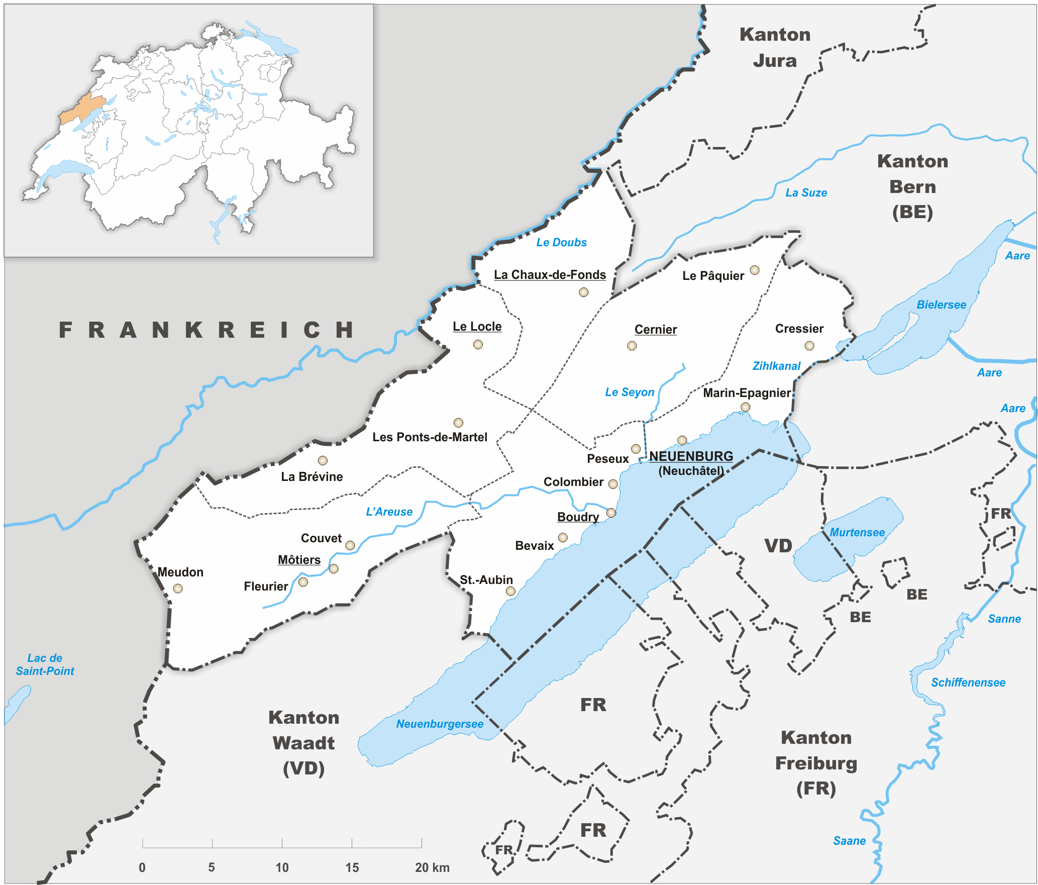 Karte des Kanton Neuenburg.